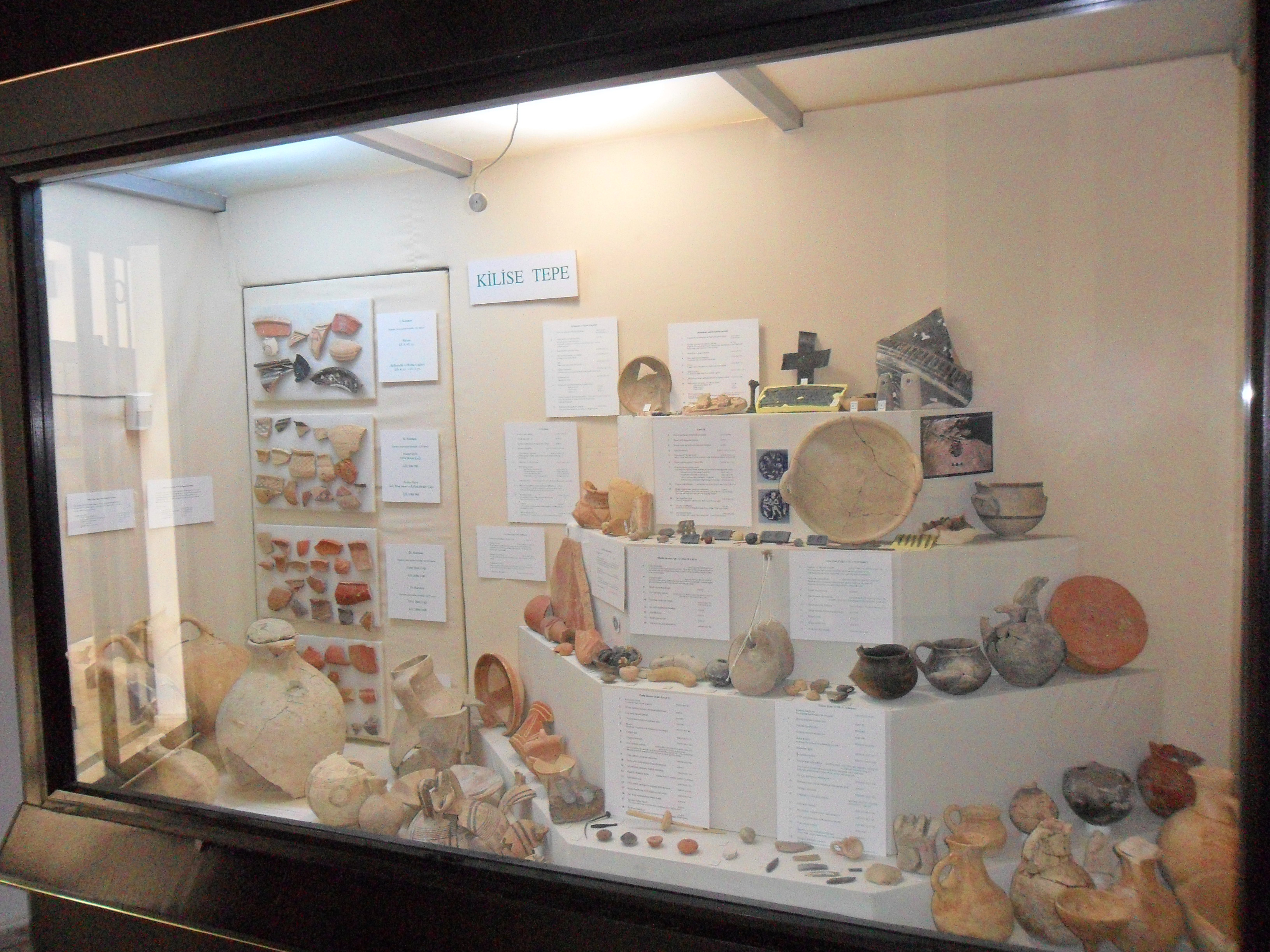 Silifke Müzesinde sergilenen Kilise Tepe buluntuları.